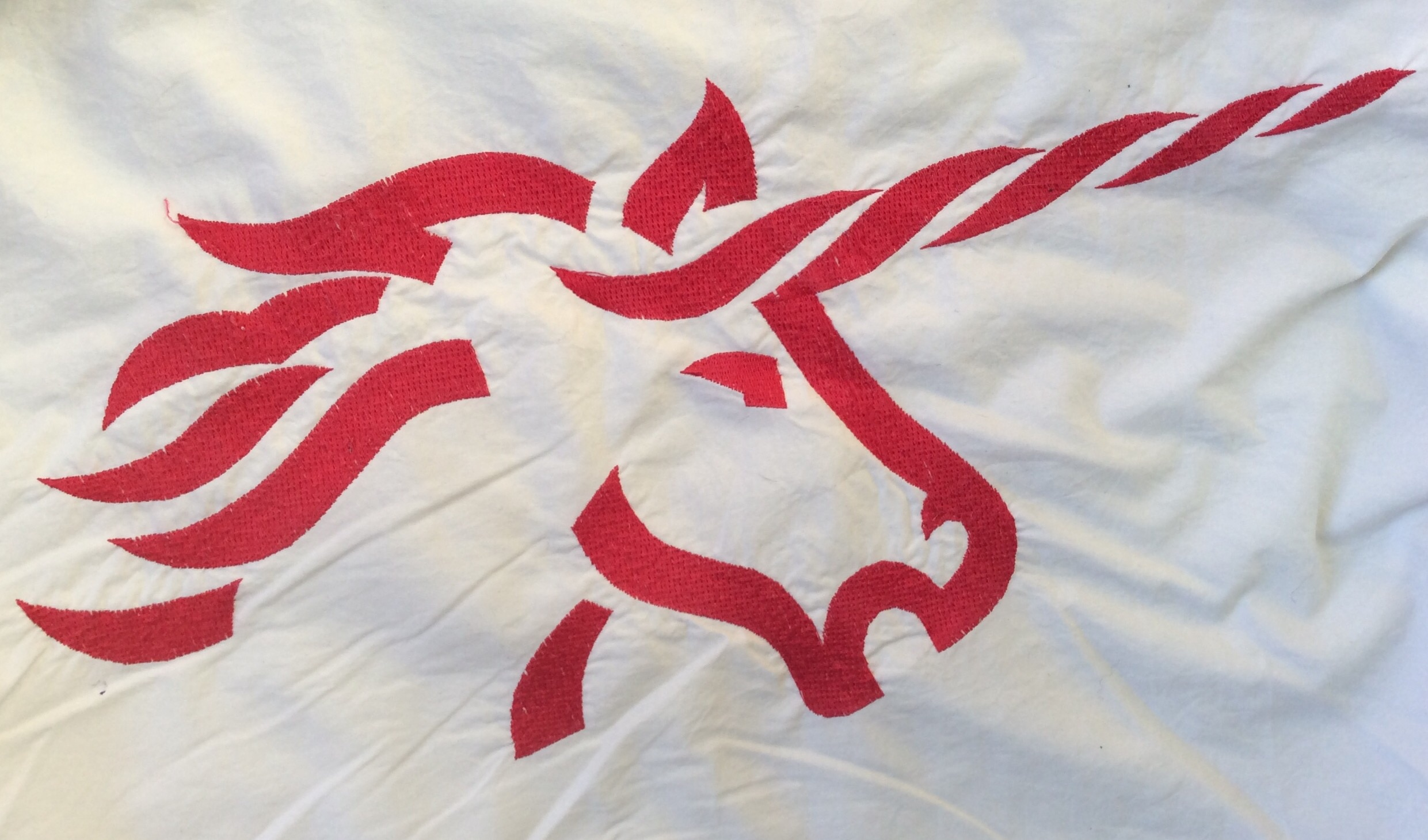 Unibanks emblem her som rygmærke på en vindjakke